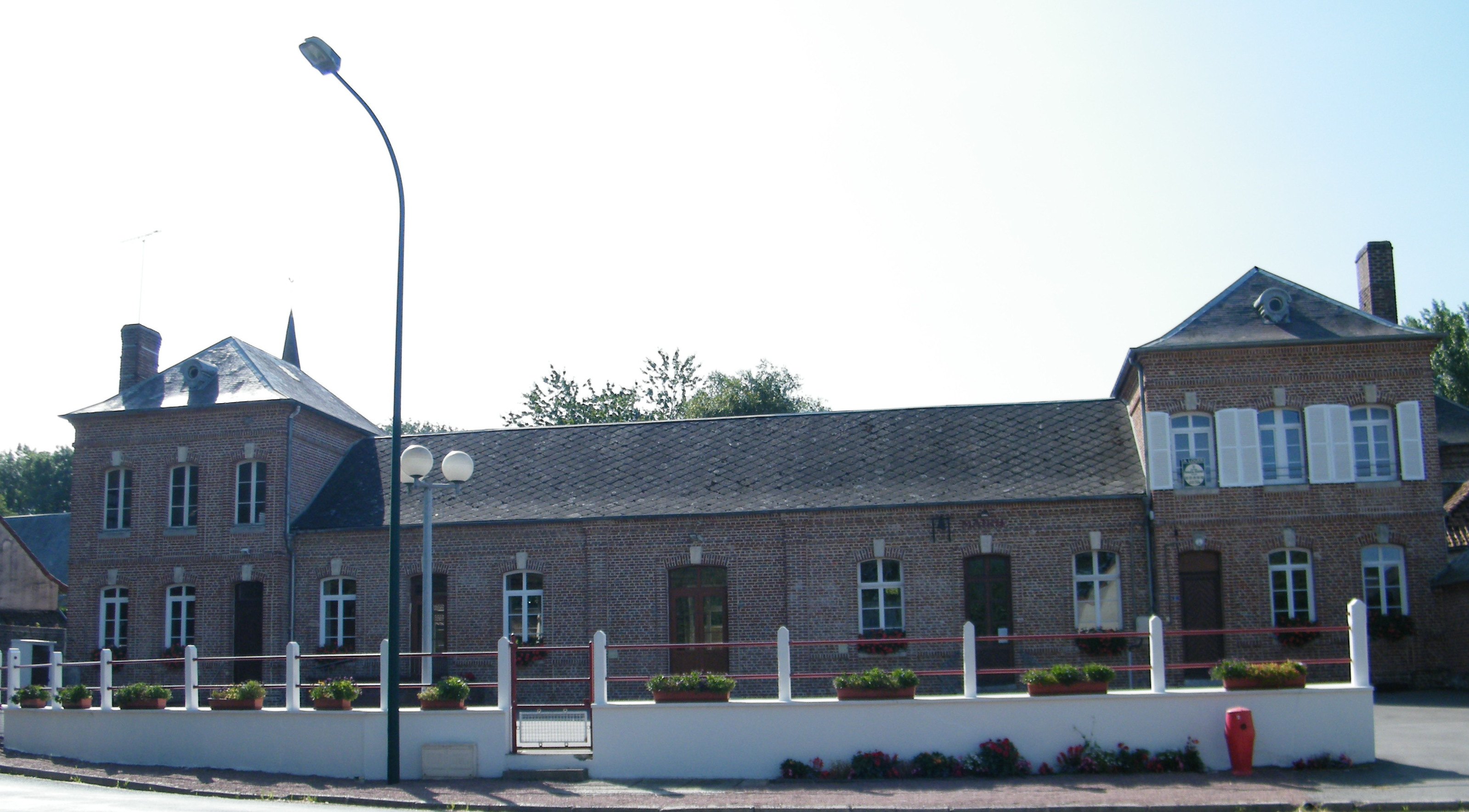 Nampont, Somme, Fr, mairie-école